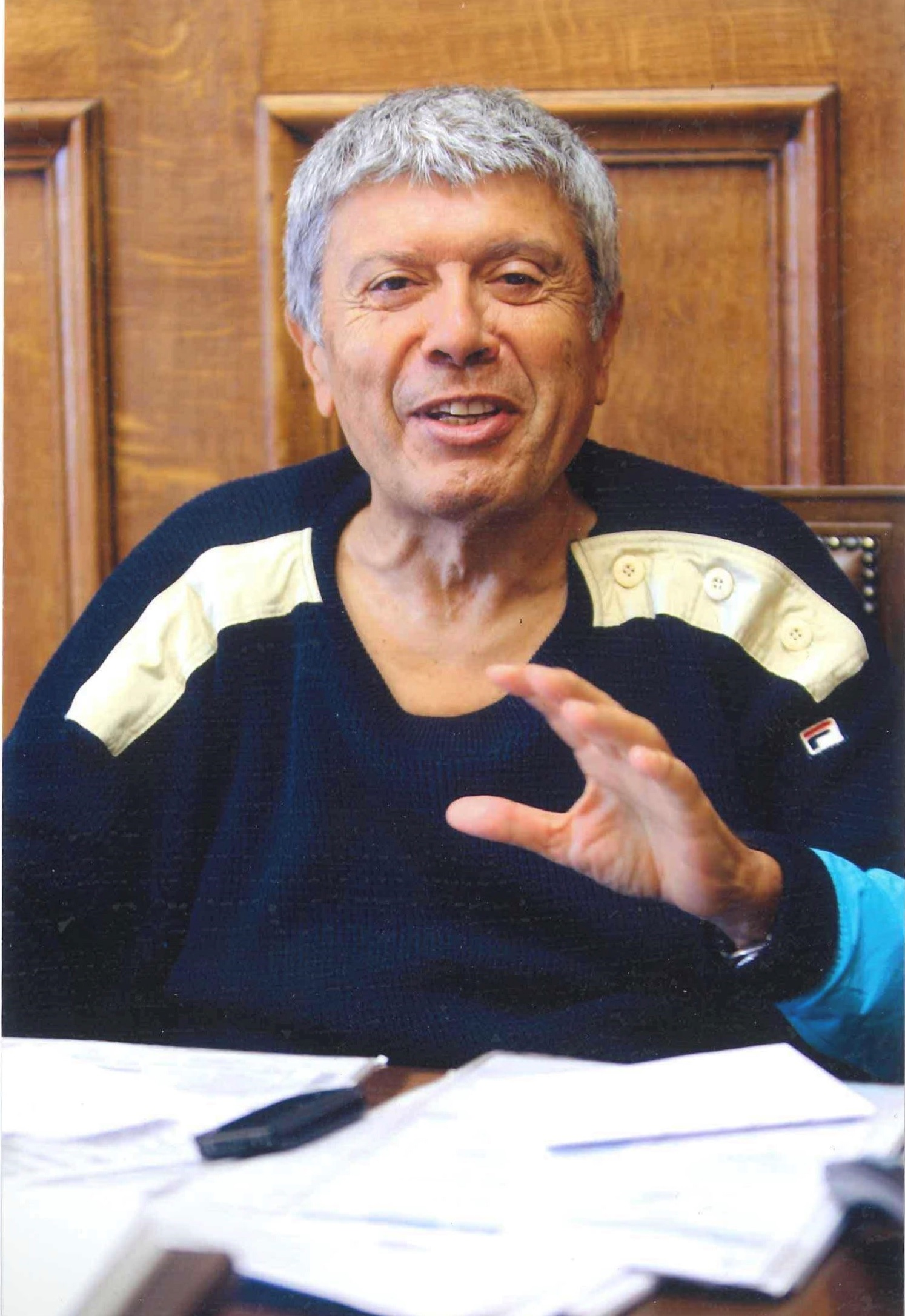 Sotiris KOSTOPOULOS